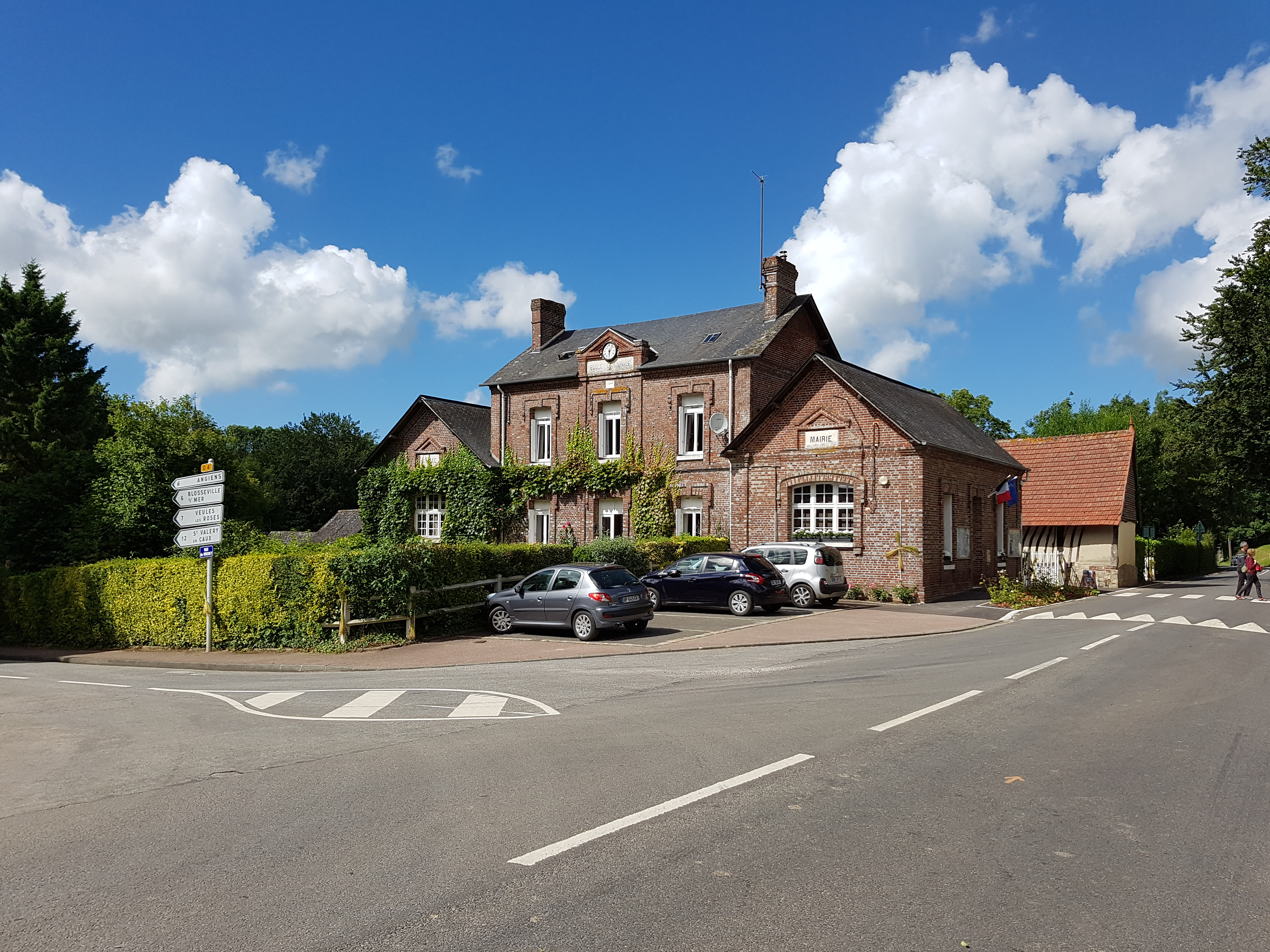 Mairie-école de La Gaillarde.